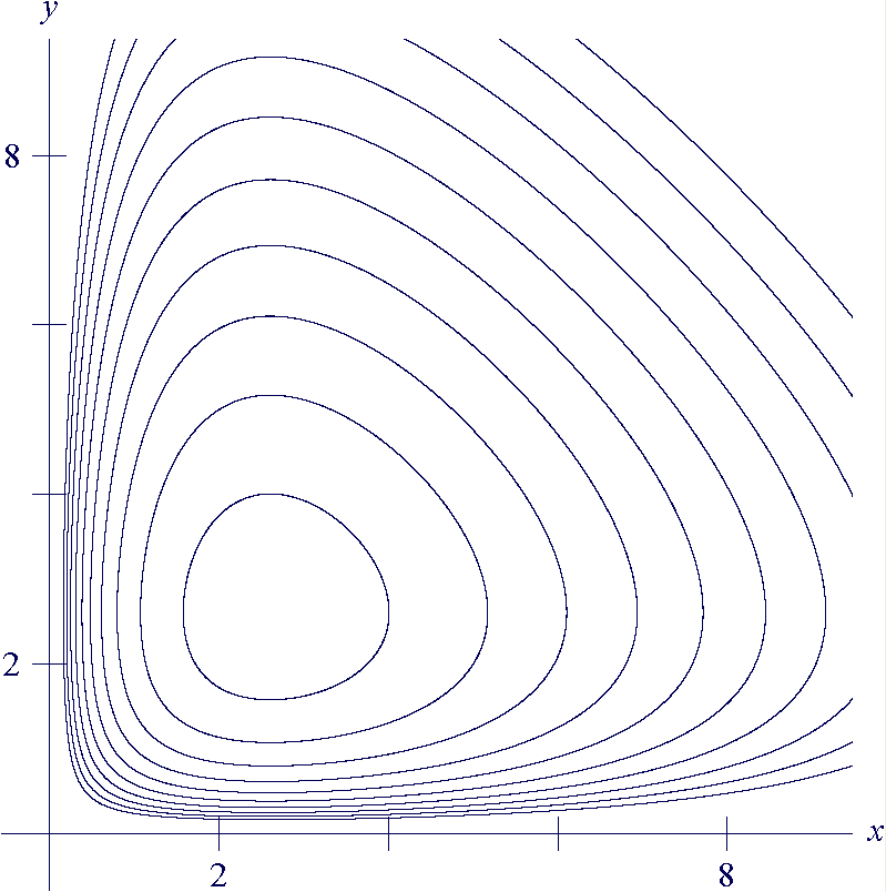 Fatto da me con Grafeq, spazio delle fasi delle equazioni di Volterra-Lotka